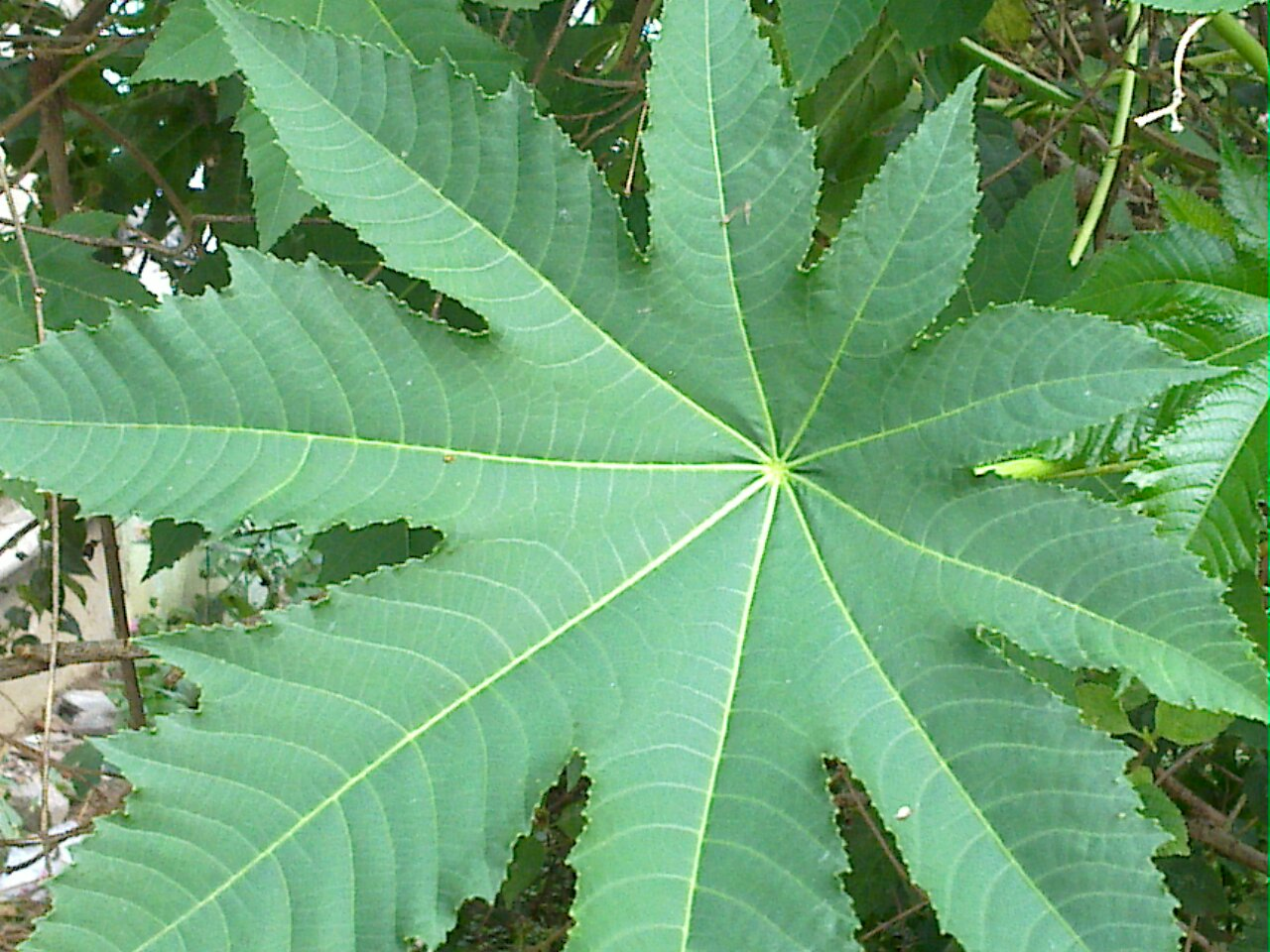 ஆமணக்குச் செடி-இலை